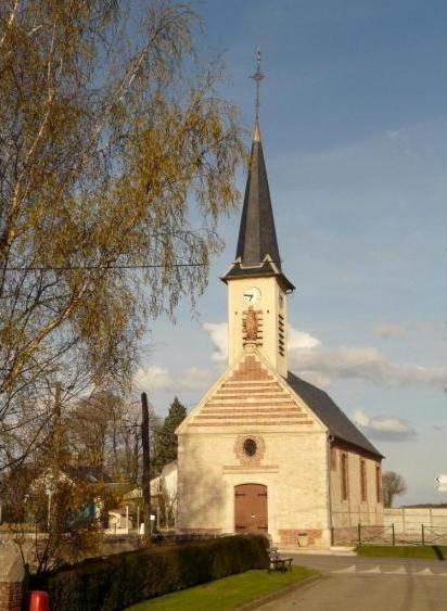 L'église St louis de Le Crocq